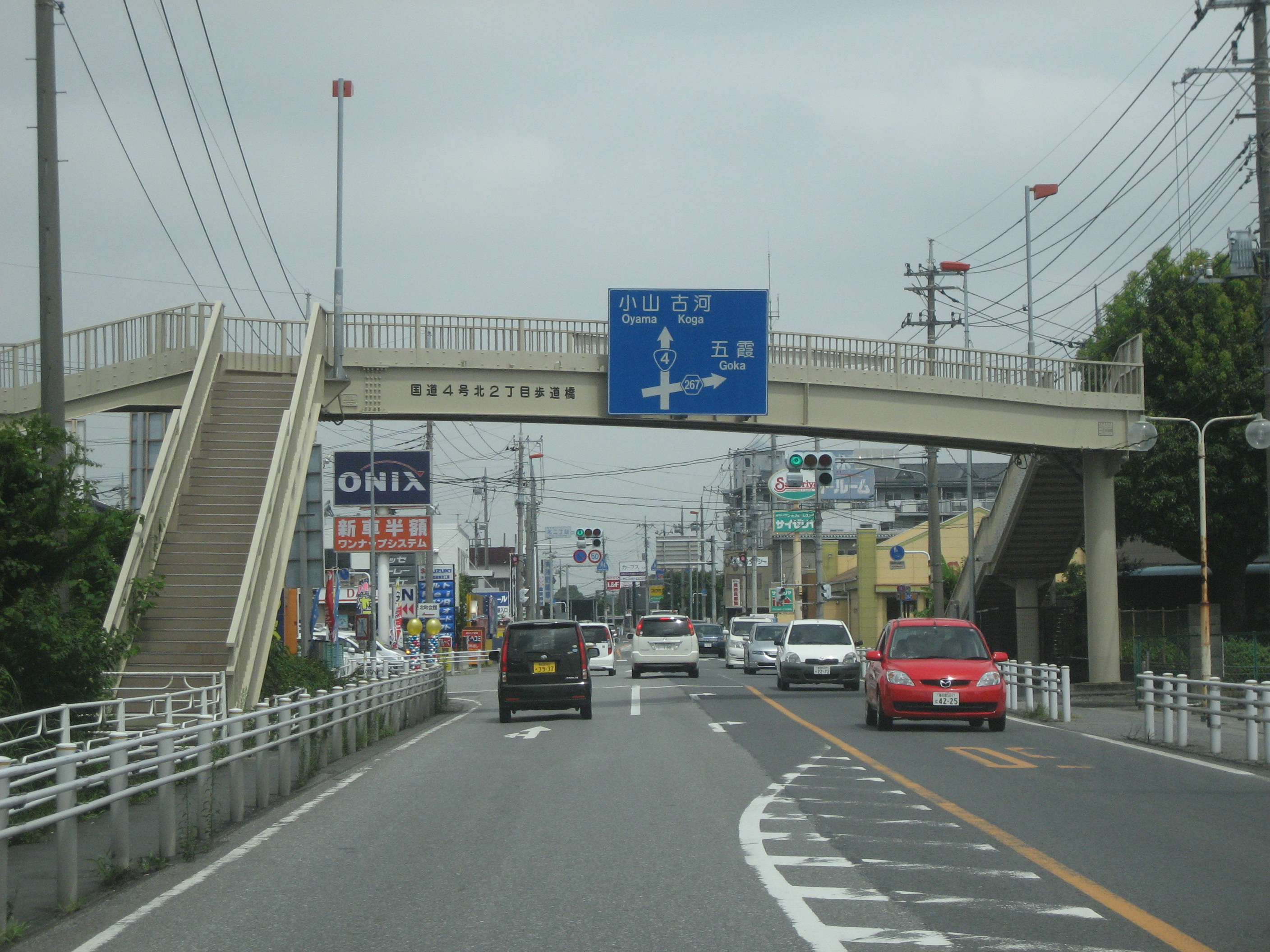 国道4号線埼玉県幸手市内